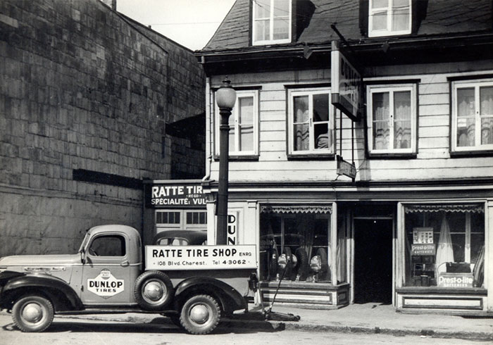 Magasin de pneus, Ratté Tire Shop, au 108, boul. Charest Est près de la rue du Pont à Québec